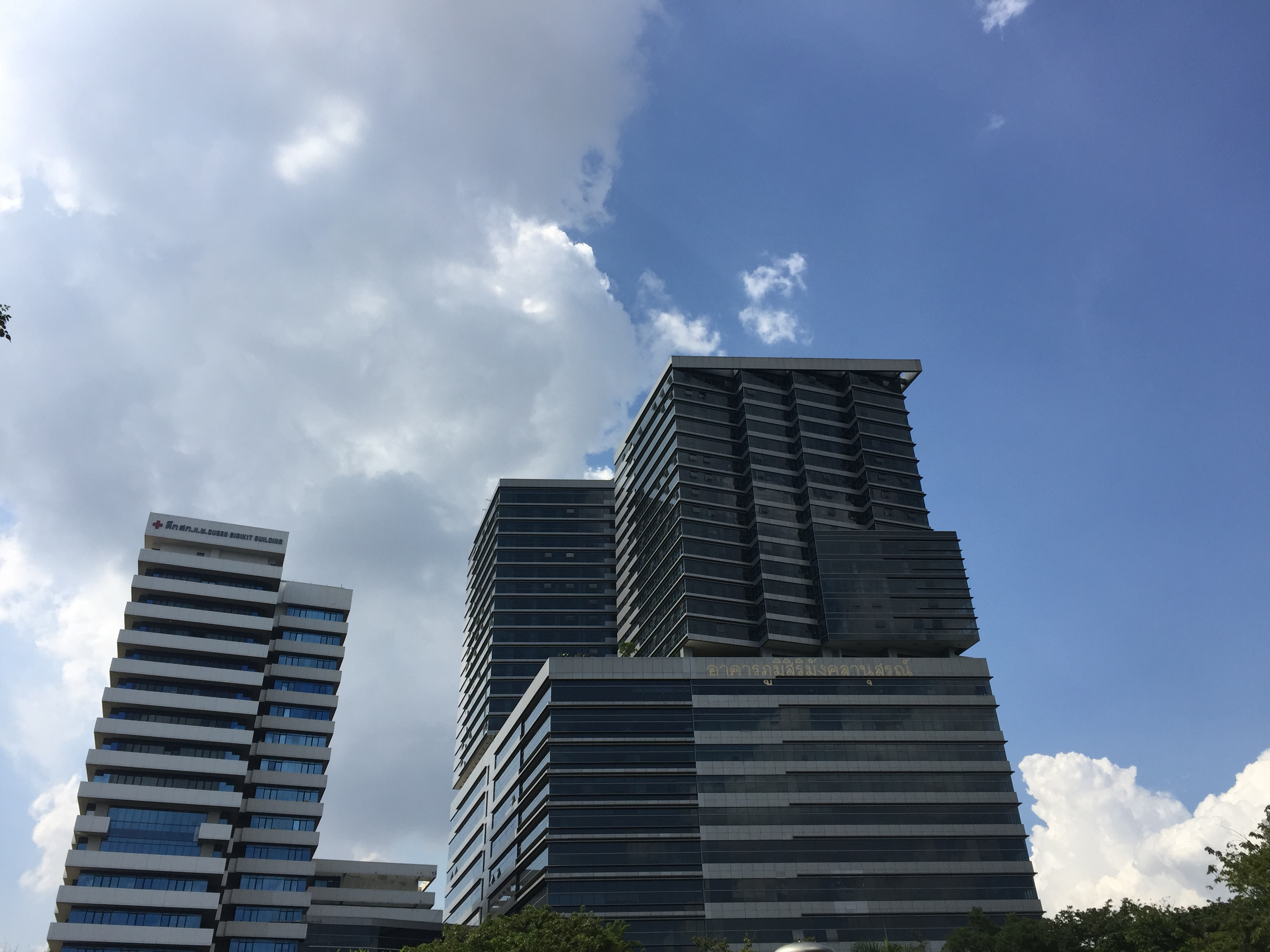 อาคารภูมิสิริมังคลานุสรณ์(ขวา)และอาคาร สก.(ซ้าย)